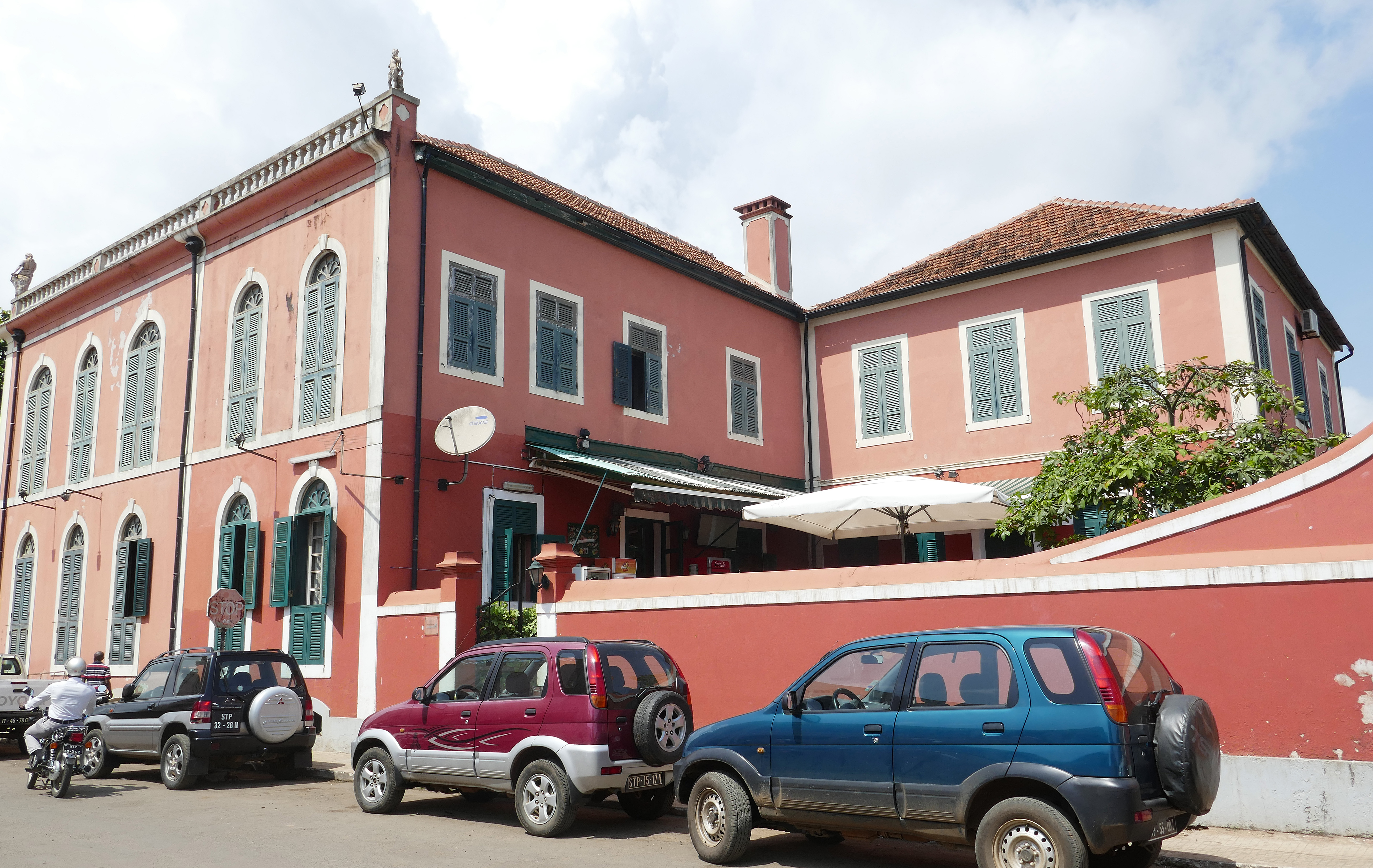 Casa da Cultura à São Tomé.